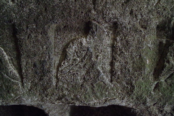 十王像と思われる彫り